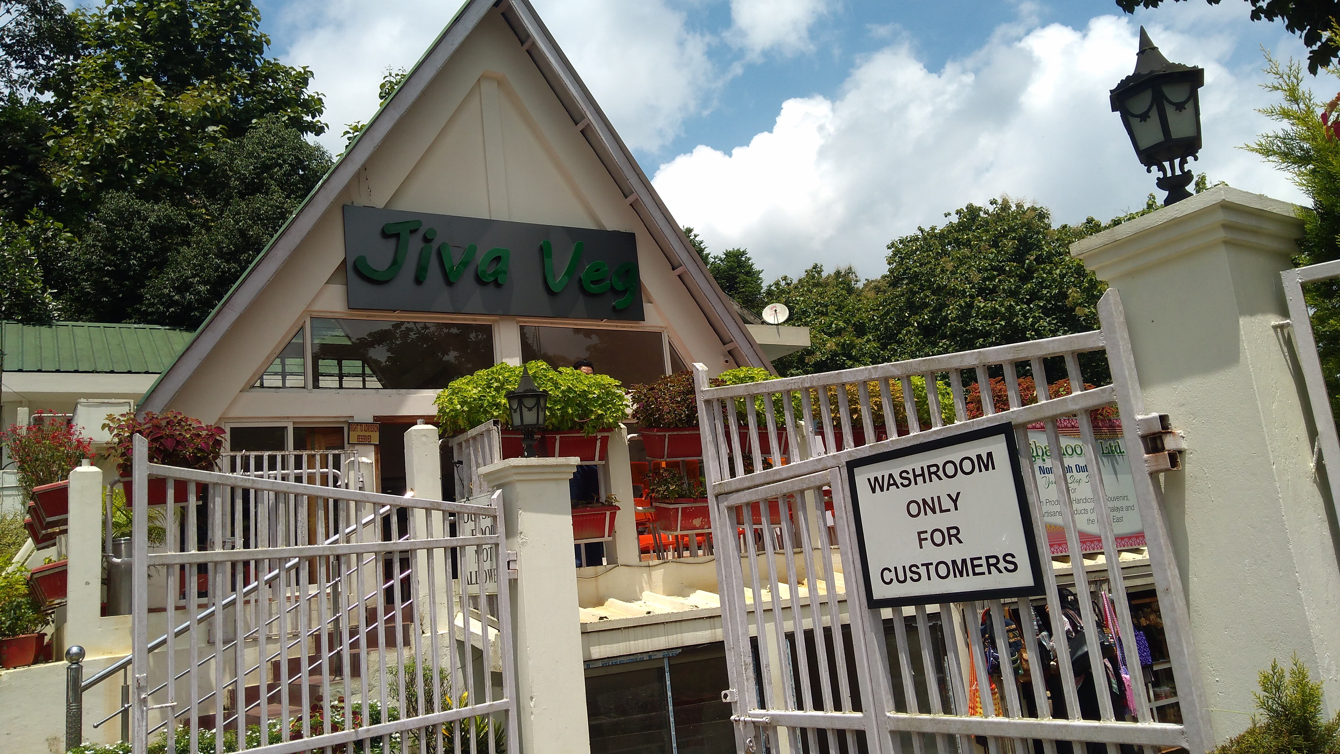 Jiva restaurant, Nongpoh, Meghalaya